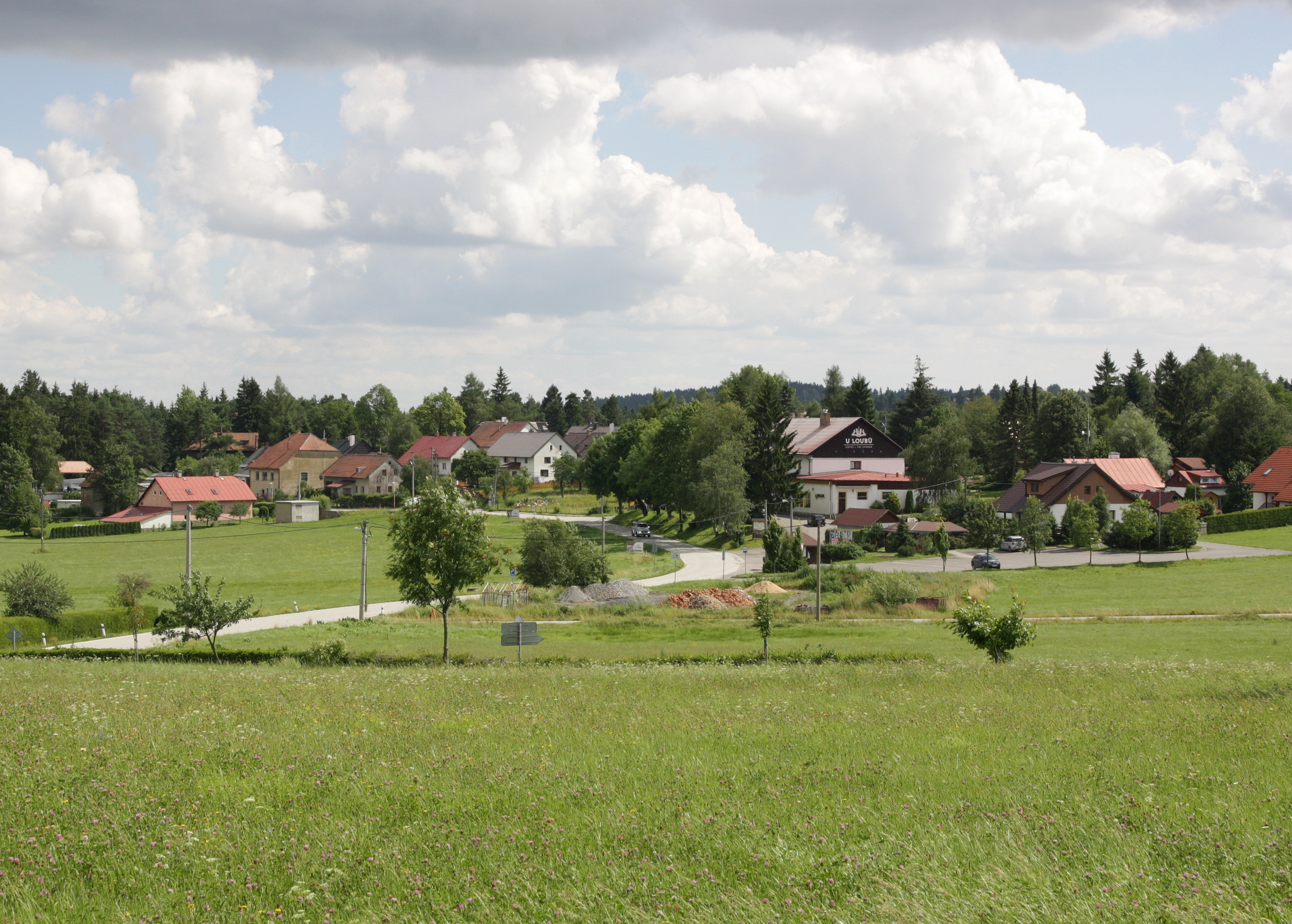 Tři Studně - pohled od severu